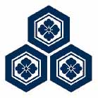 三つ盛亀甲に花菱